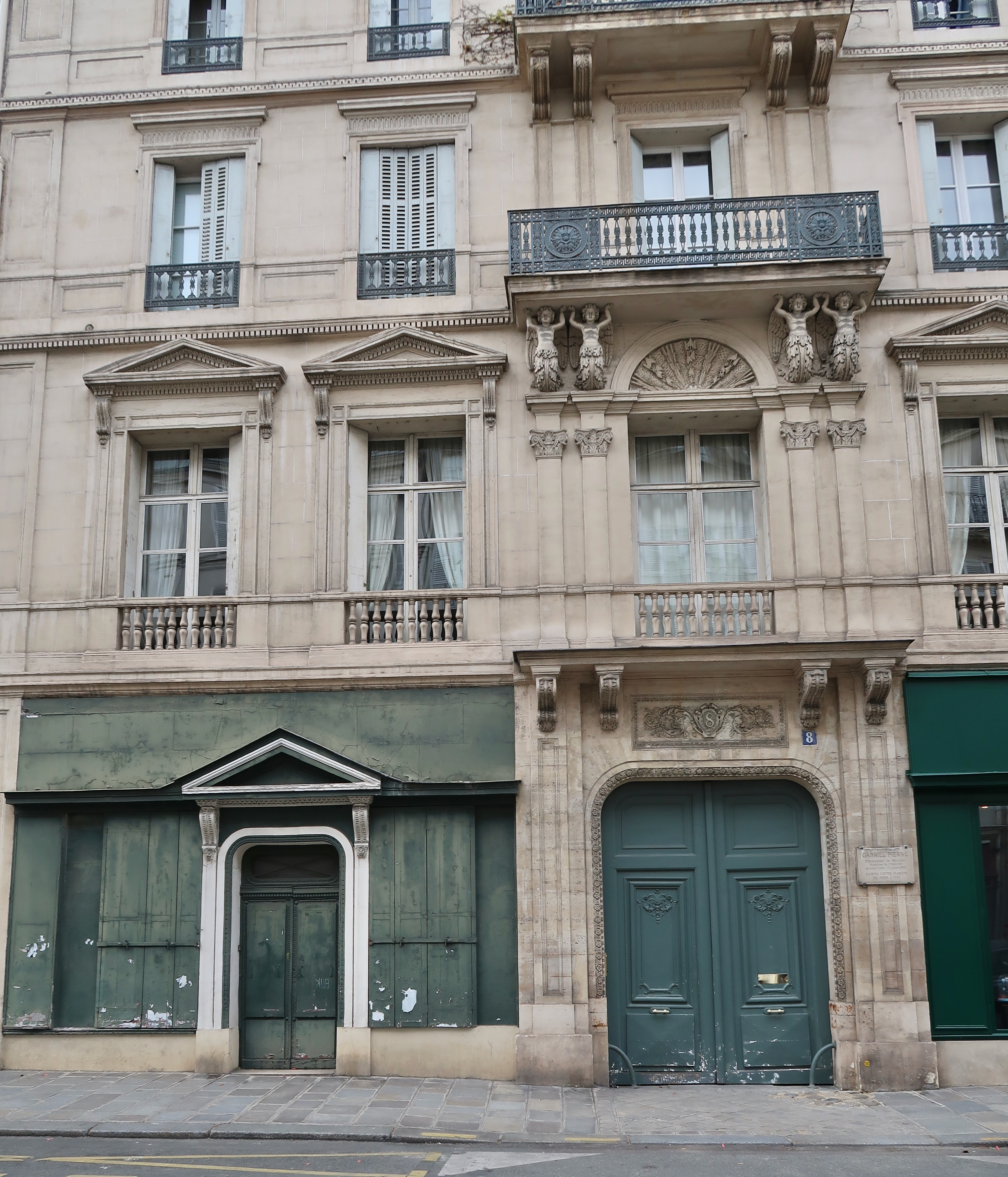 8 rue de Tournon (Paris, 6e).